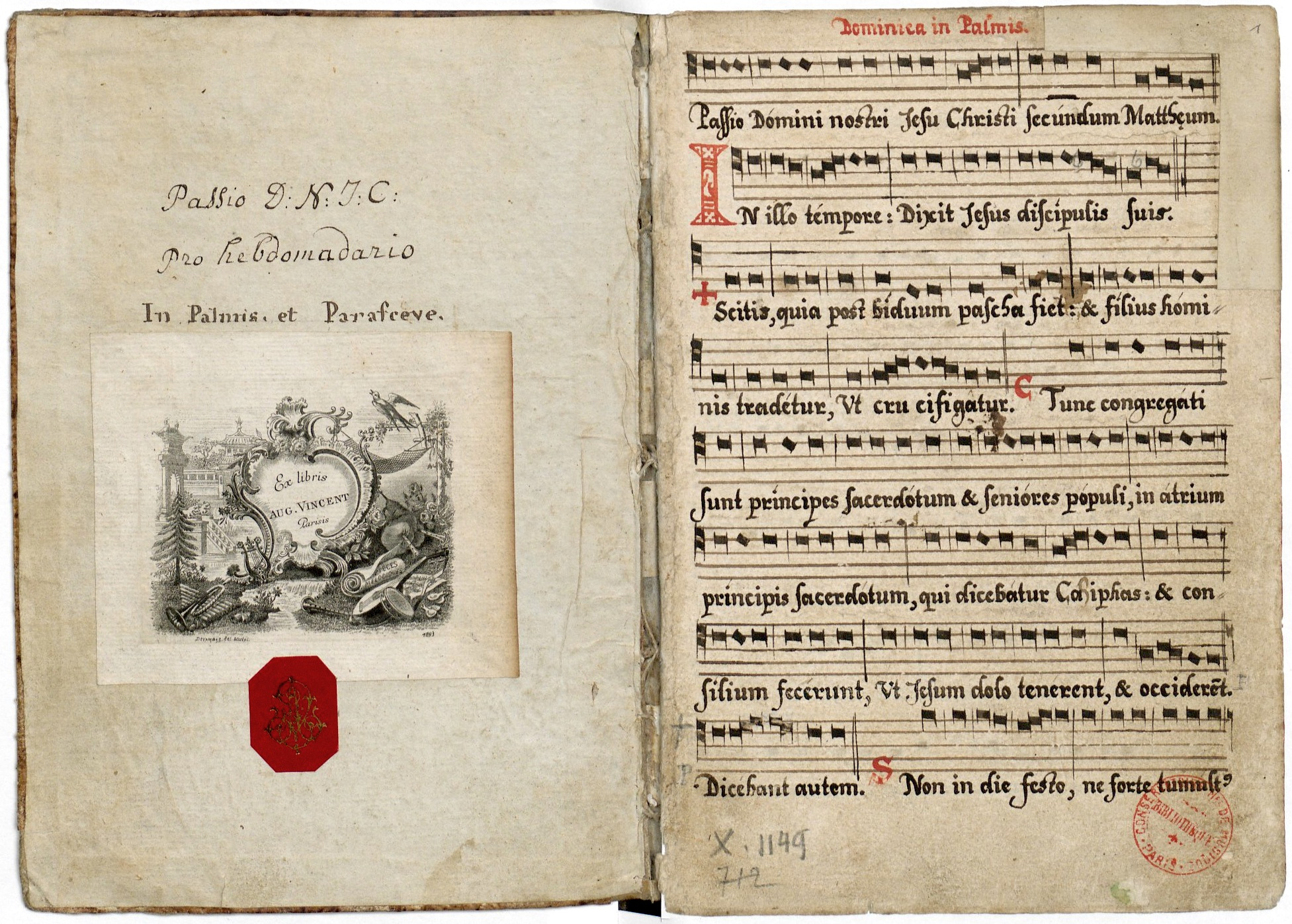 Édition manuscrite de l'office de la Semaine Sainte et de Pâques, 17../1780 (collection Auguste Vincent), 54 p., 16 x 22,5 cm